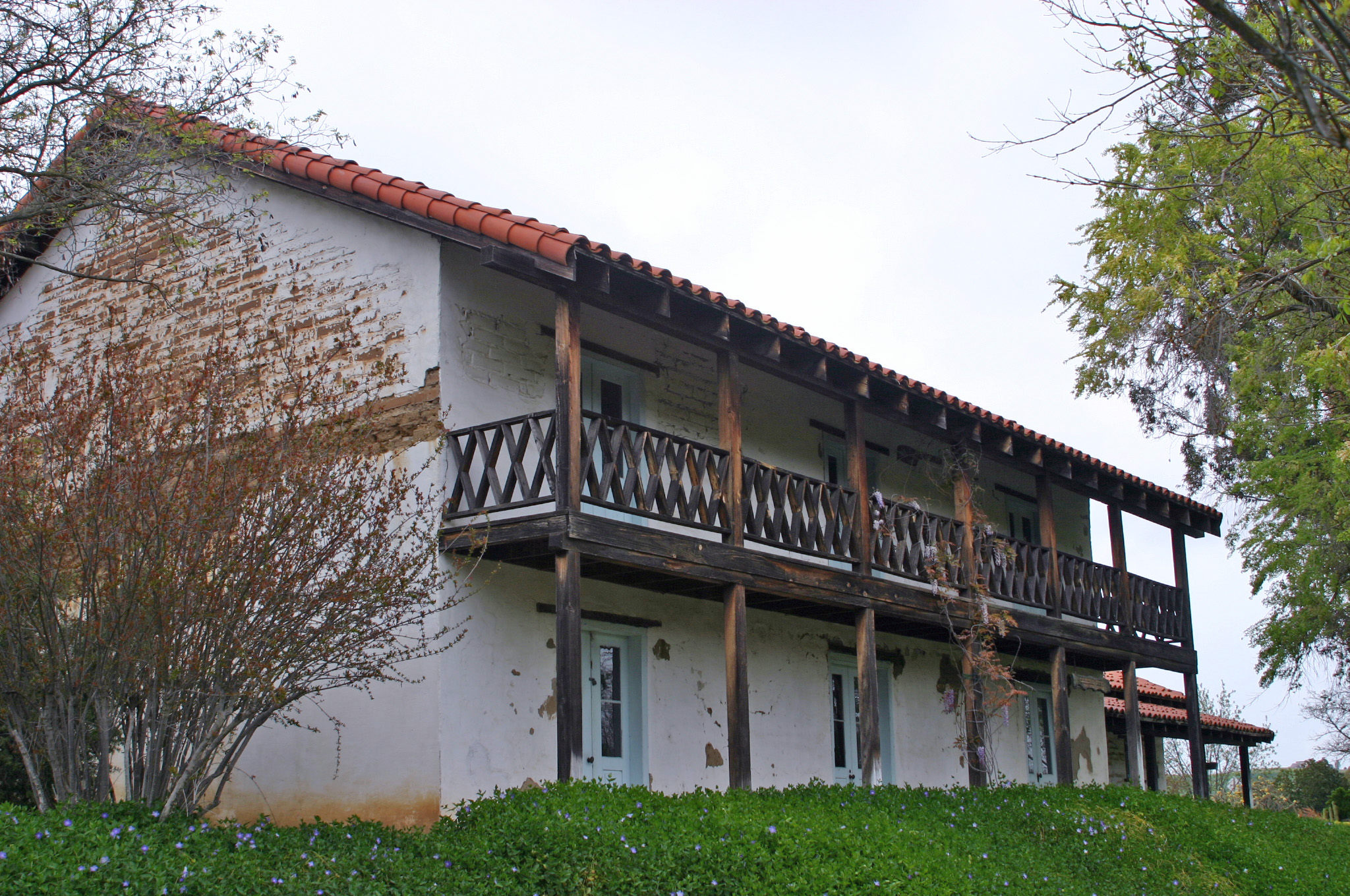 Rios-Caledonia Adobe, east side